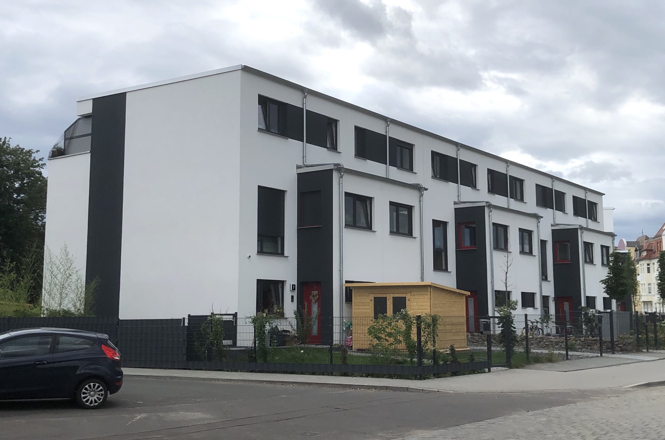 Ackerstraße 7 in Magdeburg